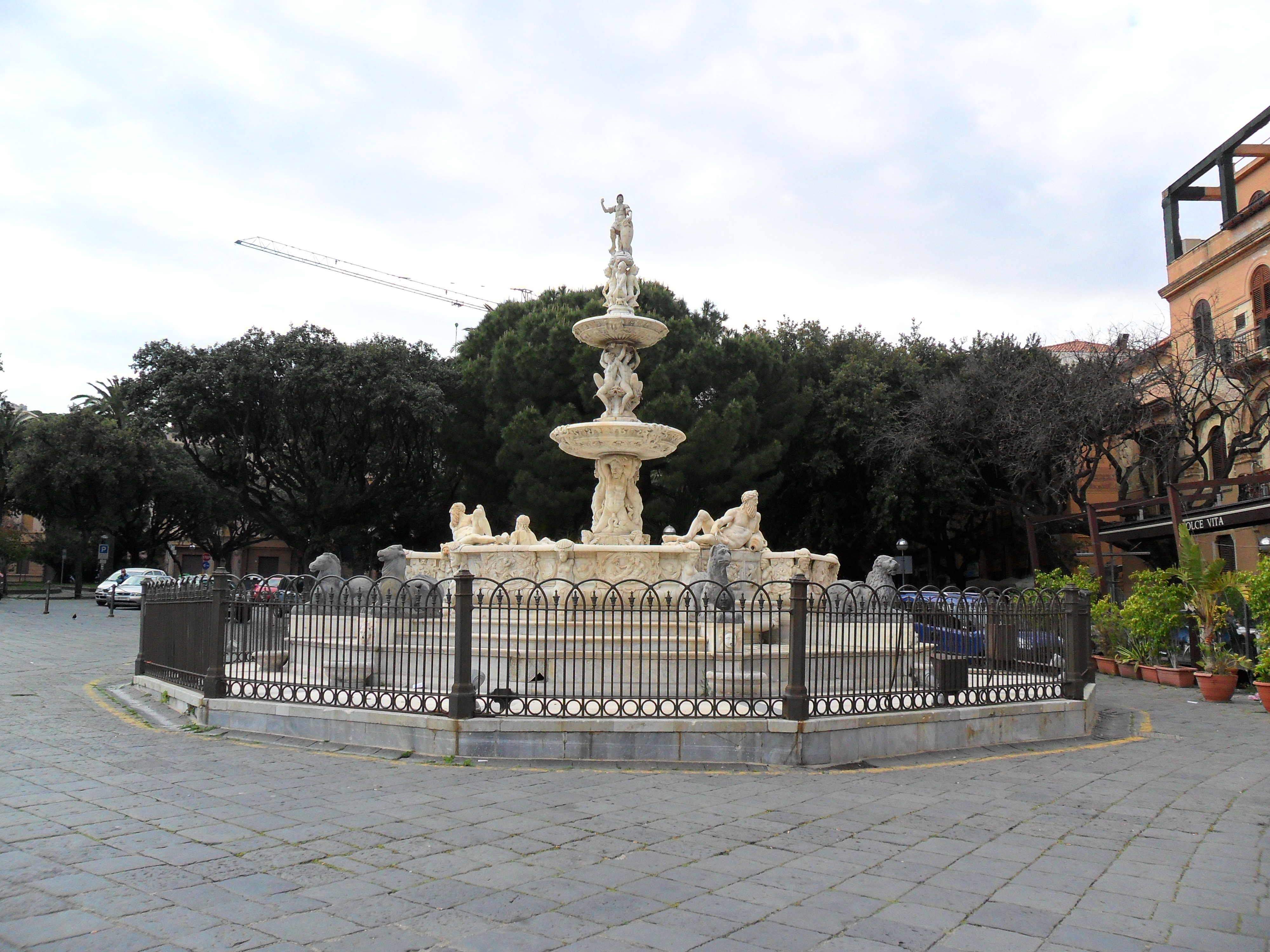 Fontana monumentale di Orione